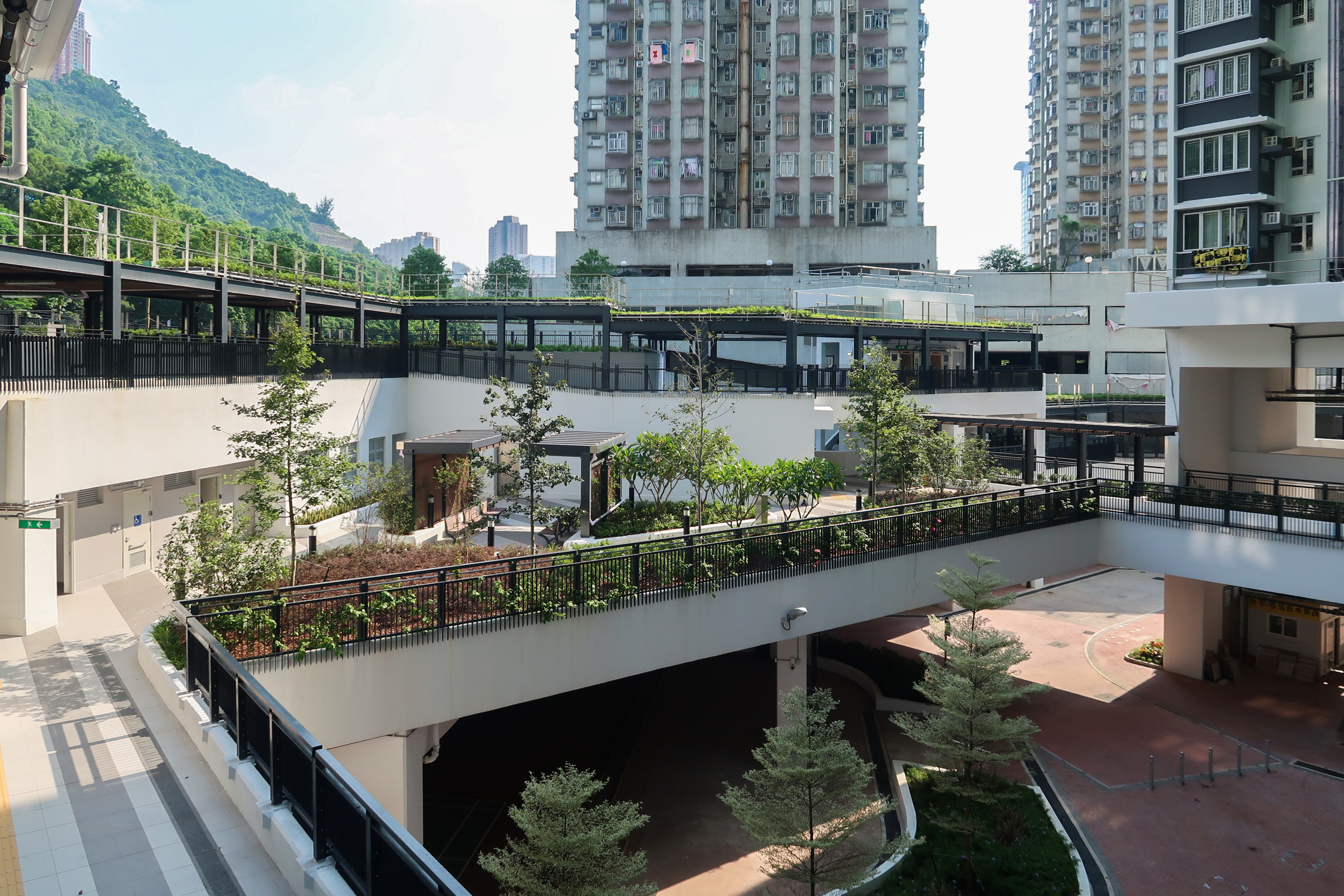 Kwai Tsui Estate Courtyard